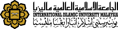 کوردیی ناوەندی: (لۆگۆی زانکۆی ئیسلامی جیھانی (مالیزیا